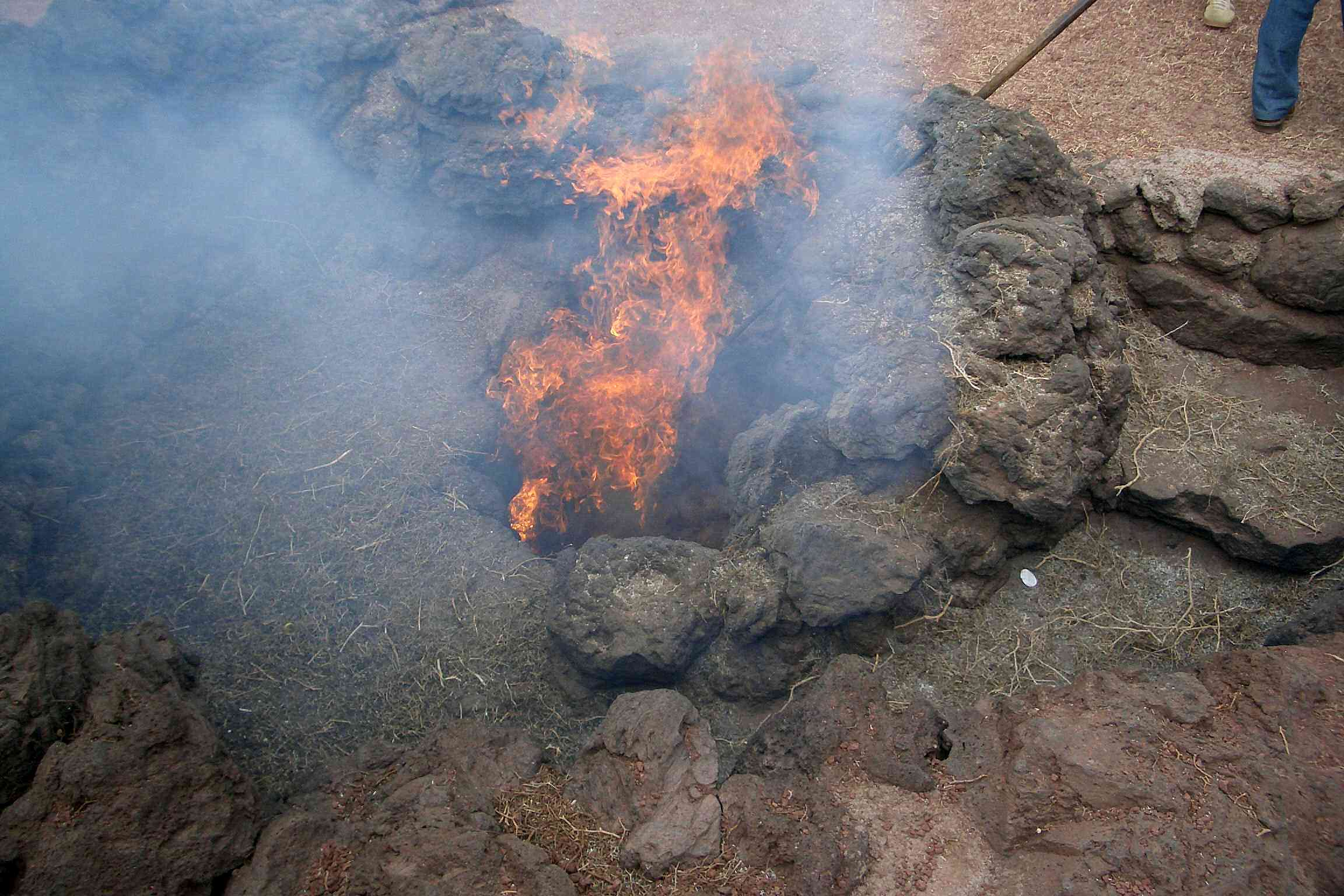 Die unterirdische Wärme des Timanfaya-Vulkans reicht aus, um einen Heuballen zu entzünden